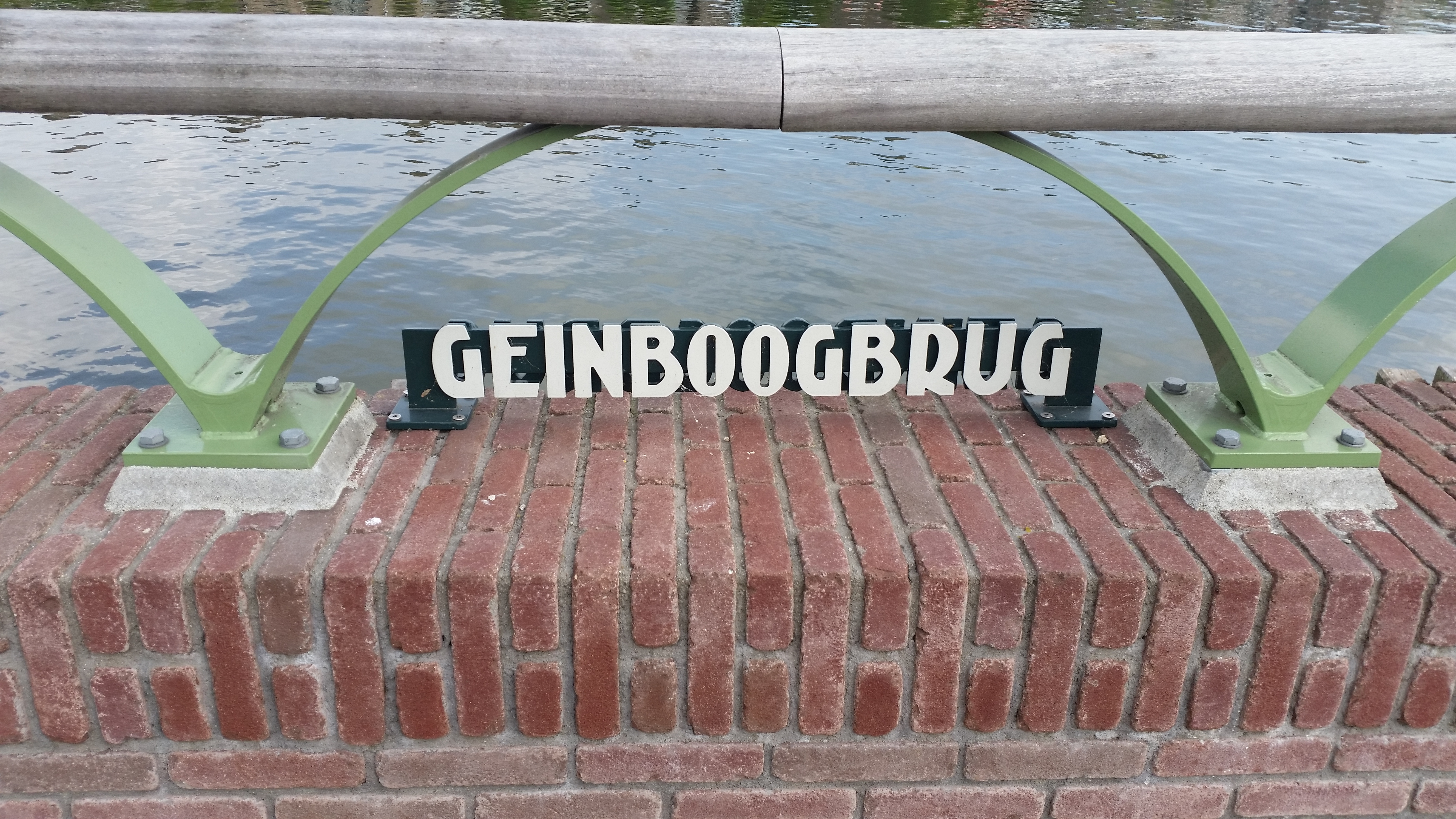 Impressie van de Geinboogbrug (juni 2020)